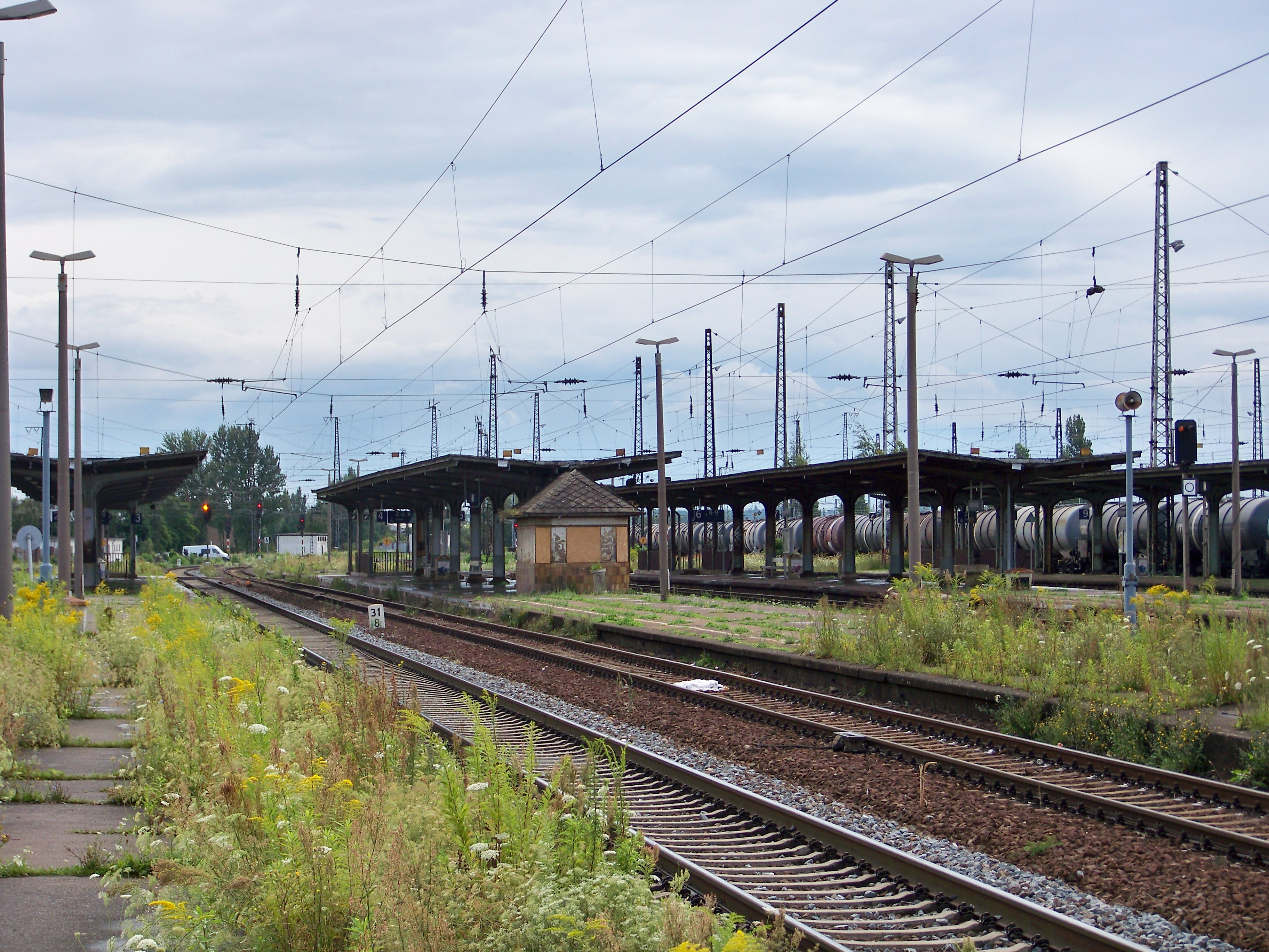 Bahnsteige des Bahnhofs Großkorbetha